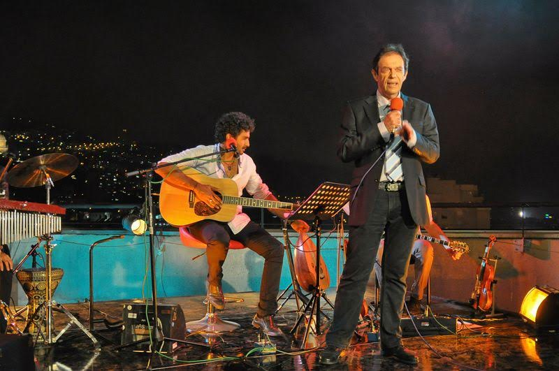 Arye Yass